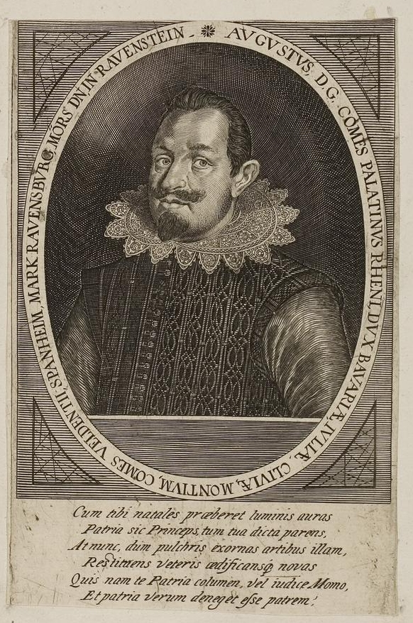 Grafik aus dem Klebeband Nr. 1 der Fürstlich Waldeckschen Hofbibliothek Arolsen Motiv: August von Pfalz Sulzbach